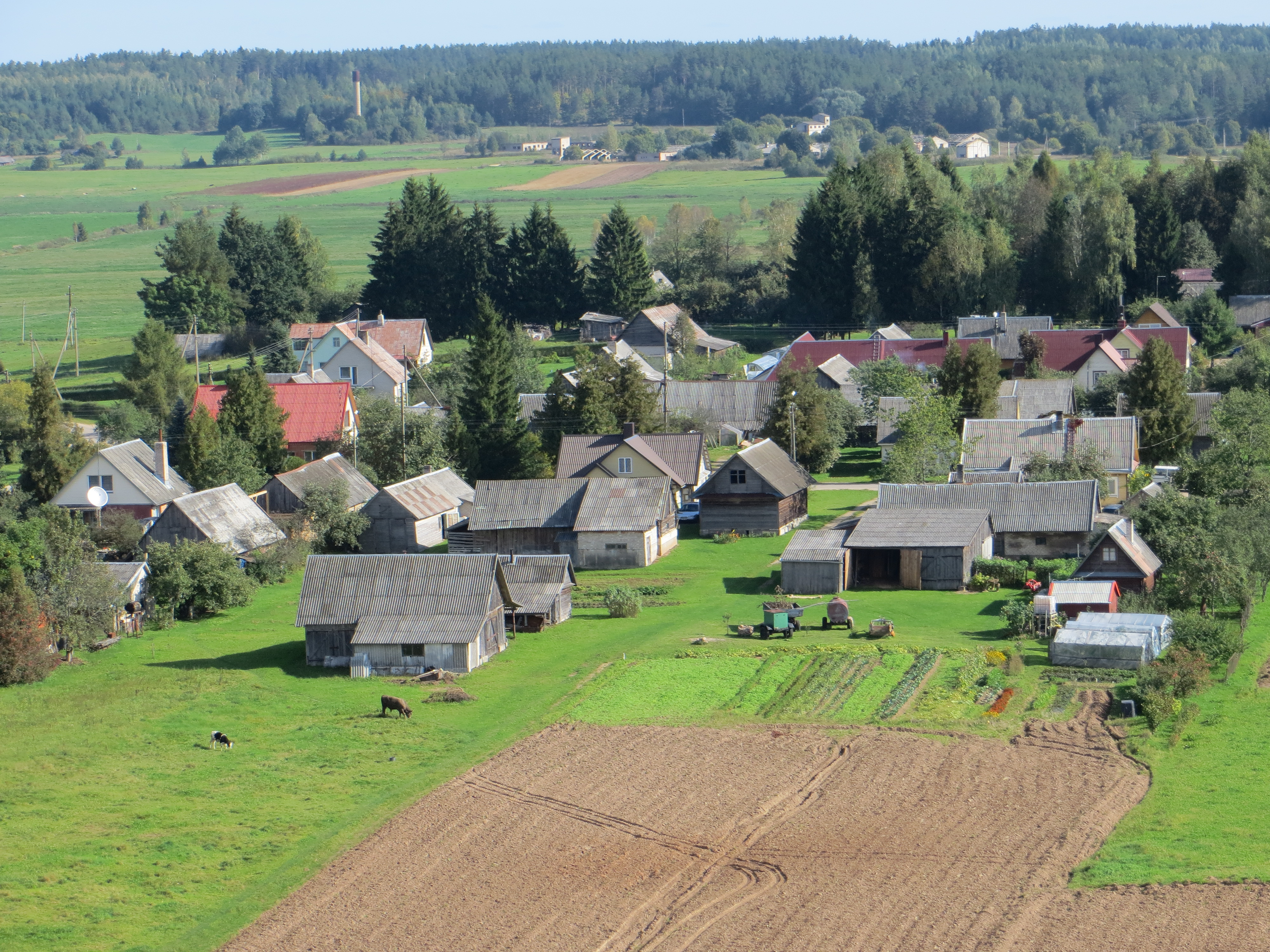 Kazitiškis, Lithuania